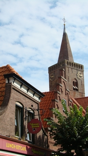 Hervormde kerk, Den Burg